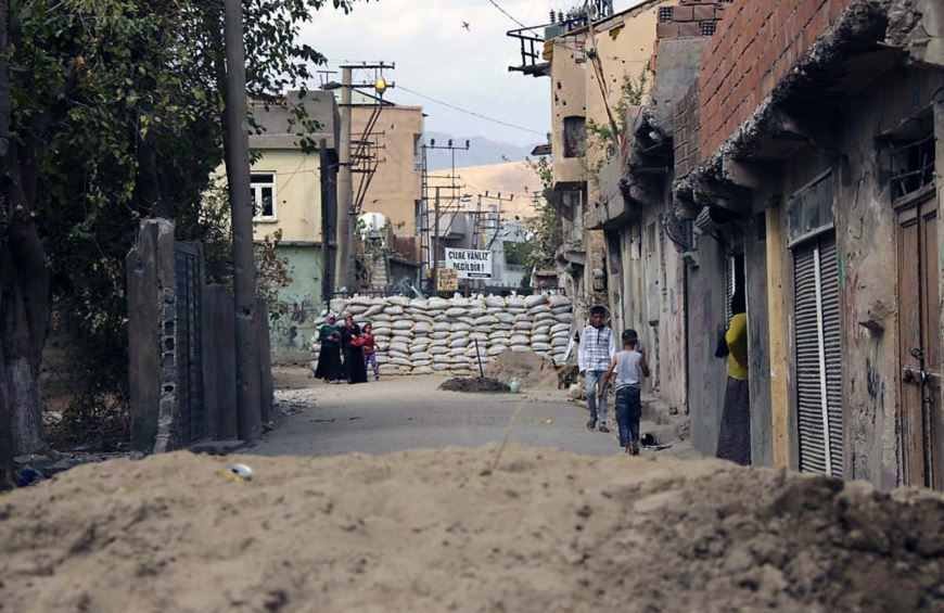 Şırnak çatışması, Ekim 2015